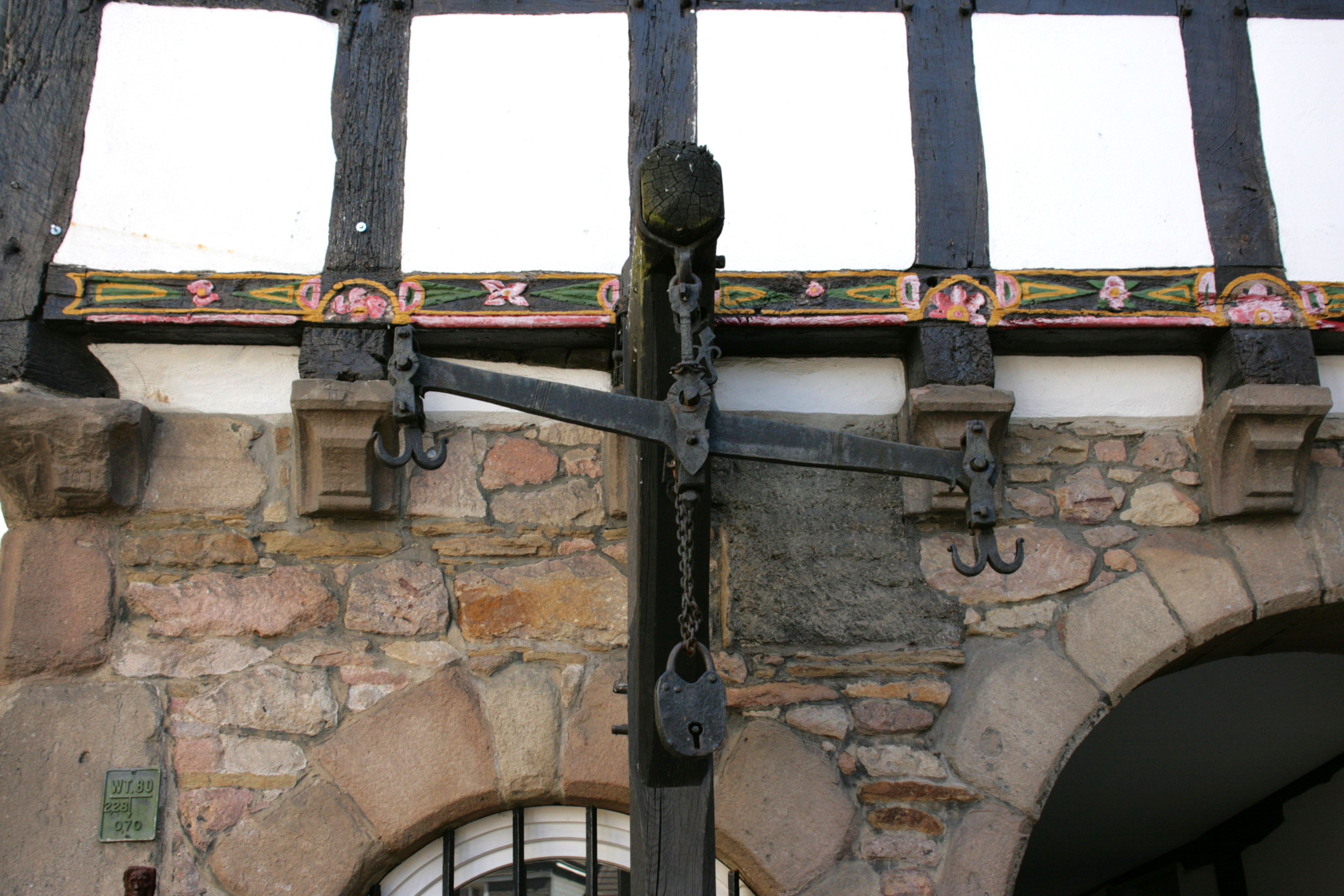 Altes Rathaus am Untermarkt in Hattingen